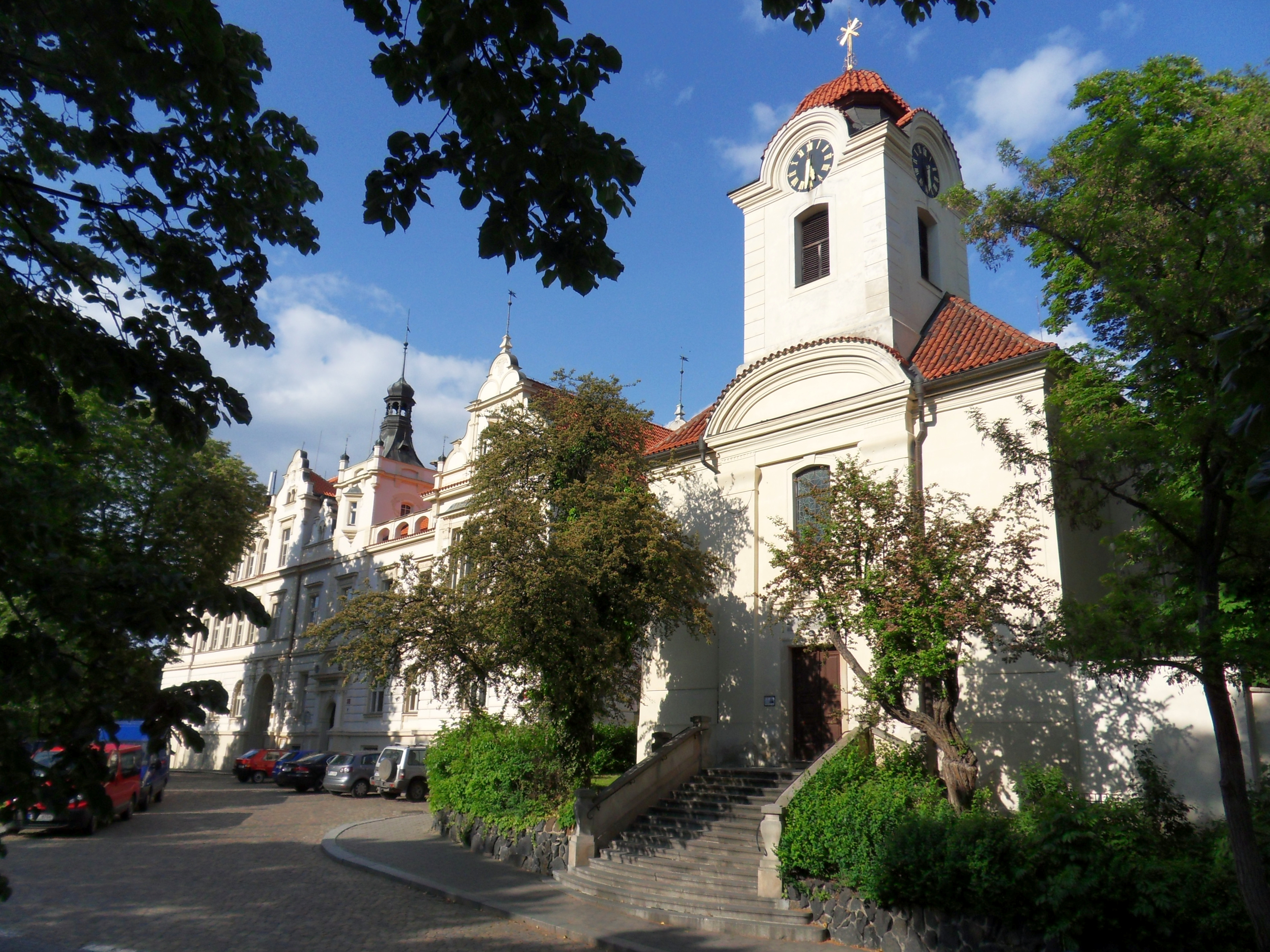 Kostel sv. Gottharda (Bubeneč), Praha 6, Krupkovo nám., Bubeneč